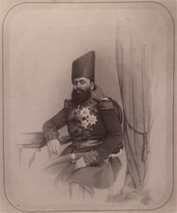 Mohammad Qasim Khan Vali